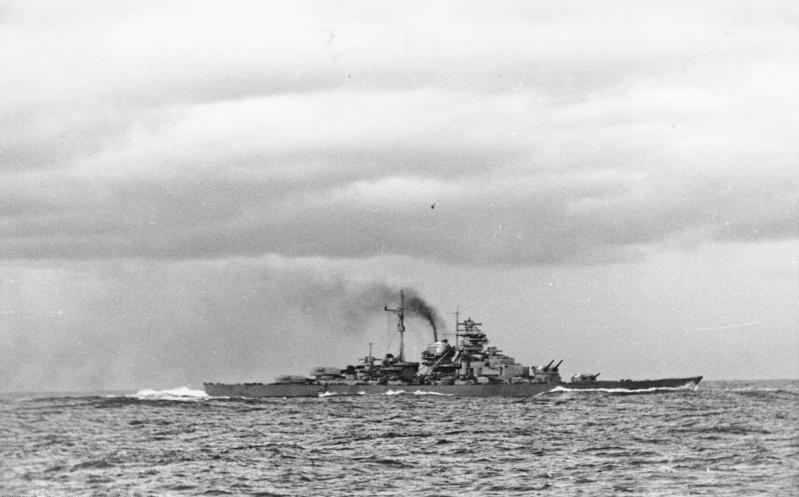 Seegefecht des Schlachtschiffes "Bismarck" unter Island. Mit zwei Treffern im Vorschiff verlässt das Schlachtschiff Bismarck den Schauplatz des Seegefechtes unter Island. Prop.Kp.: MPA Nord Film-Nr.: 100/28 Bildberichter: Lagemann Wilhelmshaven, Herausgabedatum: Juni 1941 Information added by Wikimedia users.Möglicherweise vor dem Gefecht aufgenommen